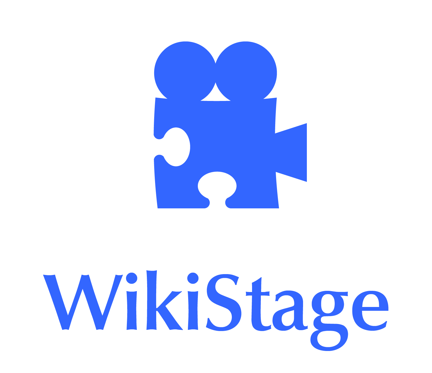 Das WikiStage Puzzleteil symbolisiert Partizipation und die Kreation eines Gesamtbildes durch Zusammenarbeit